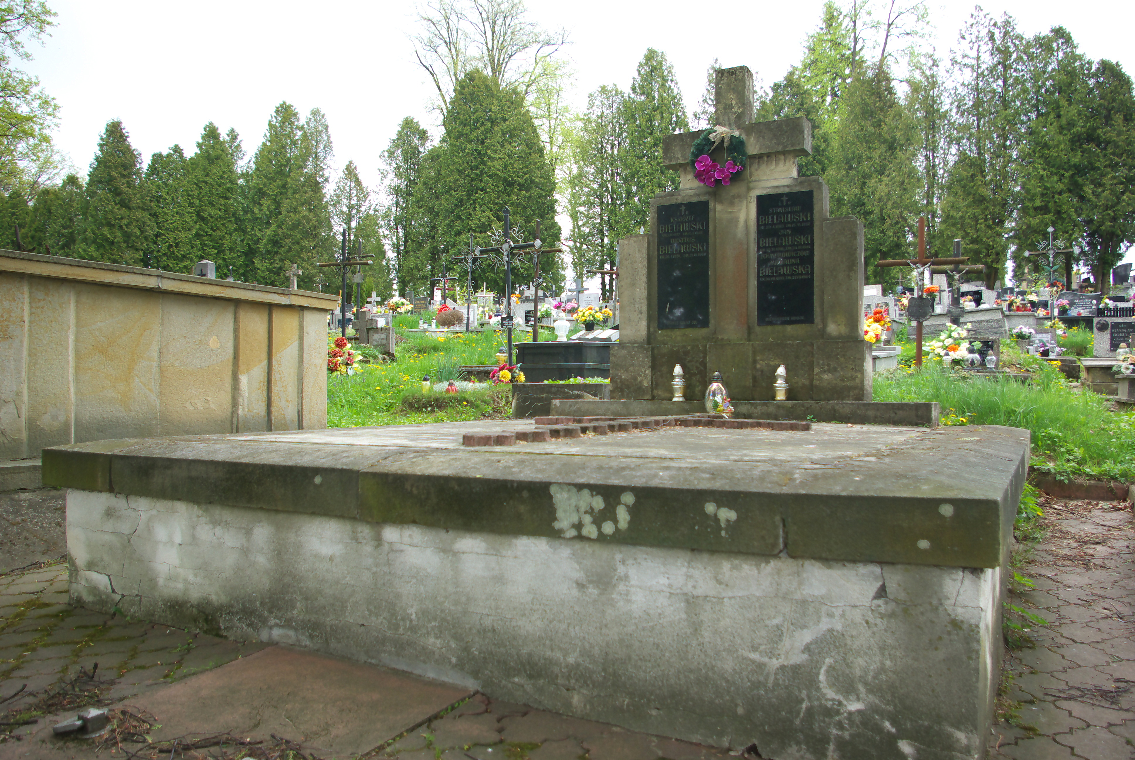 Grobowiec Bielawskich na Cmentarzu Komunalnym w Brzozowie